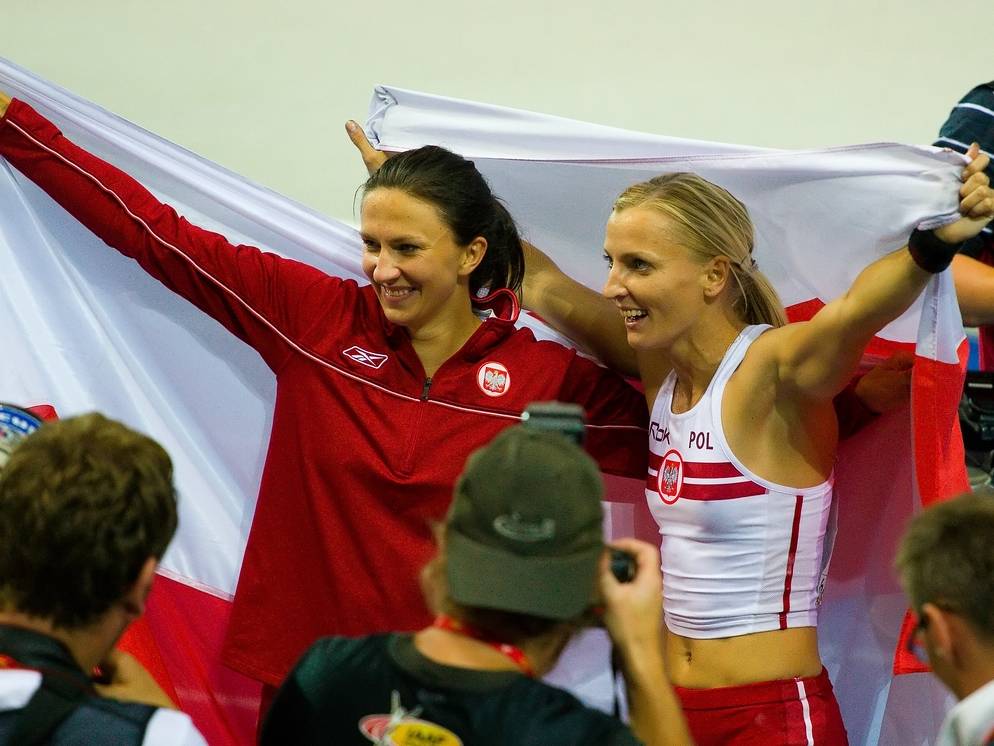 Die Überraschungssieger im Stabhochsprung: 1. Rogowska, 3. Pyrek